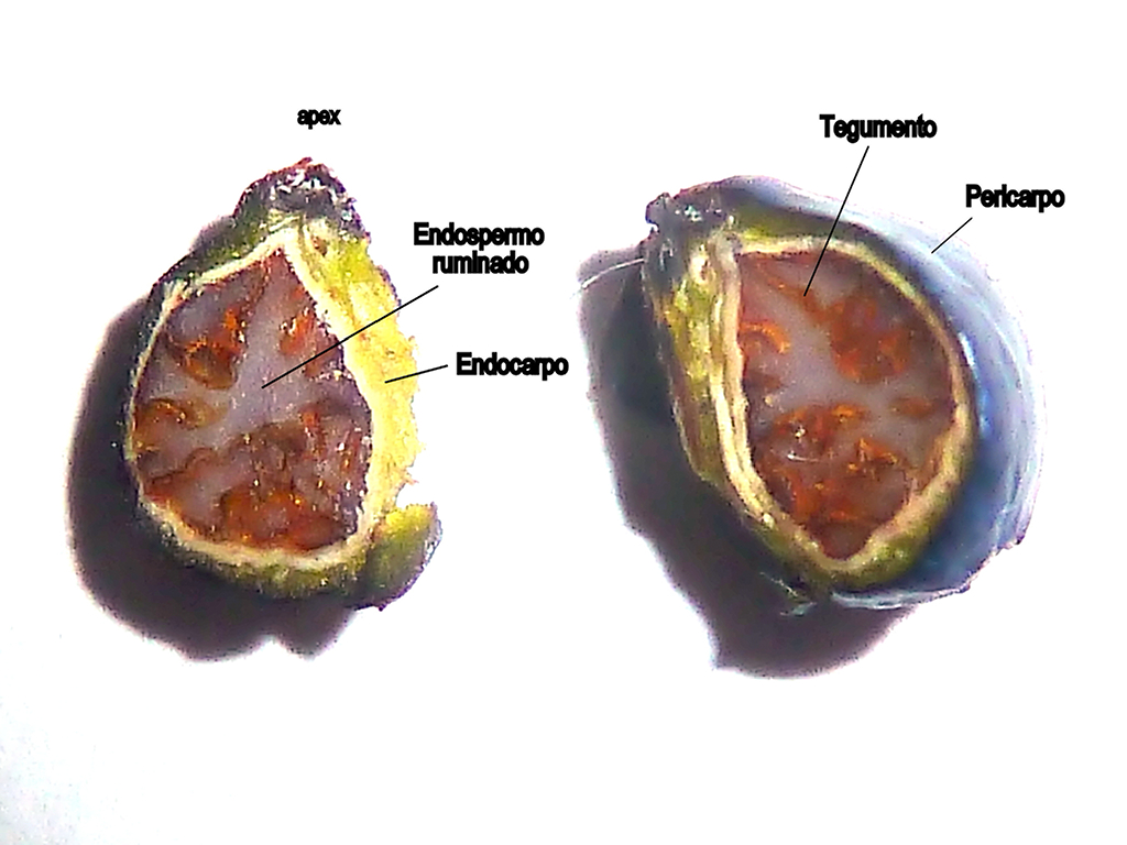 Viburnum tinus (Durillo) - Fruto, corte longitudinal - Ornamental/cultivado, Calle Goya, Madrid (España).